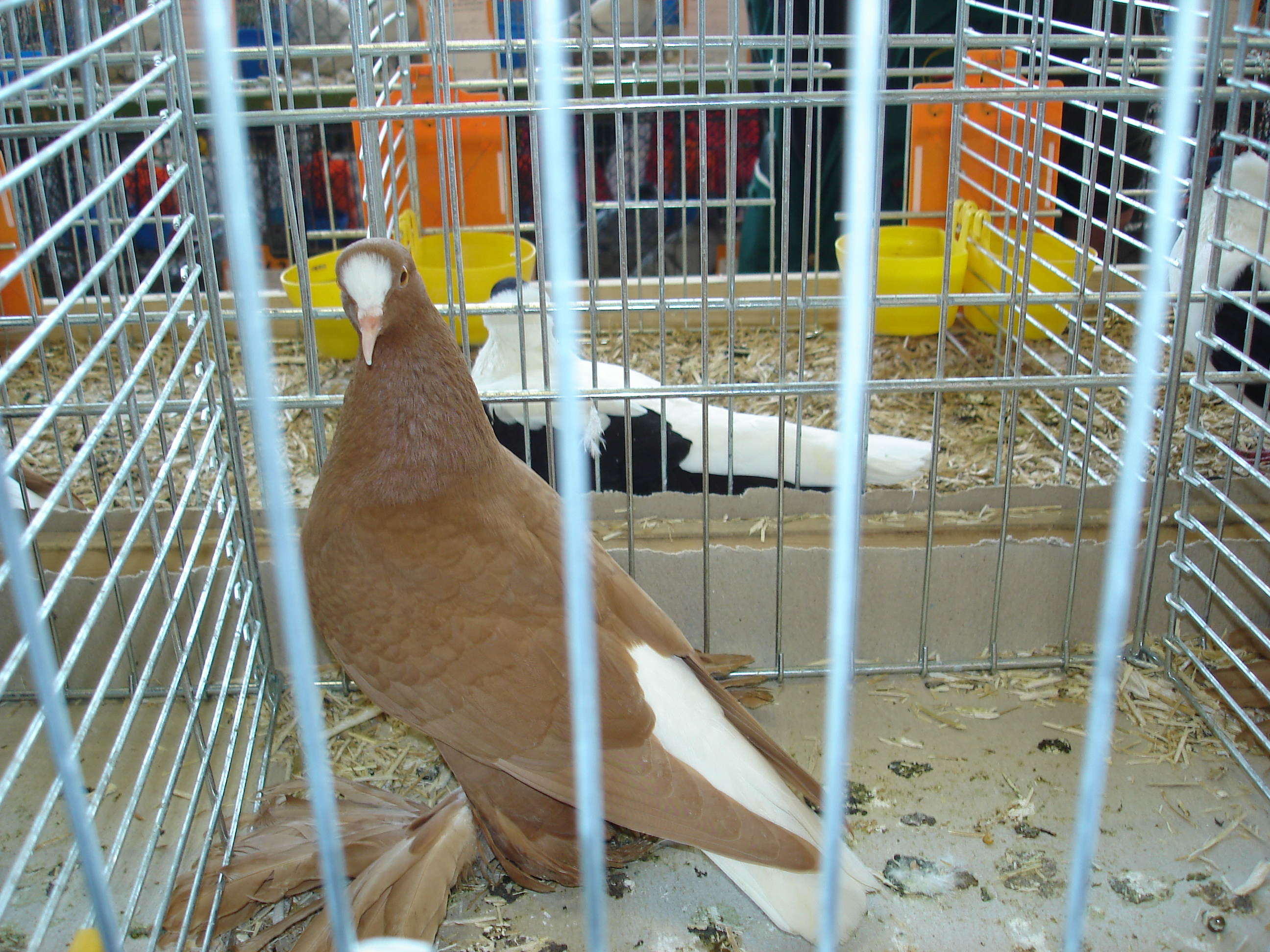 Zdjęcie gołębia rasy saksońki białogon